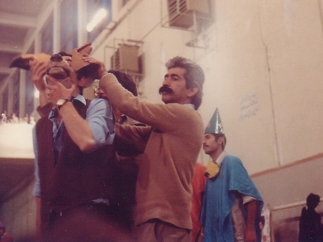 گیلکی: عباس آقا کارگرˇ ایران‌ناسیؤنالˇ صحنه سر